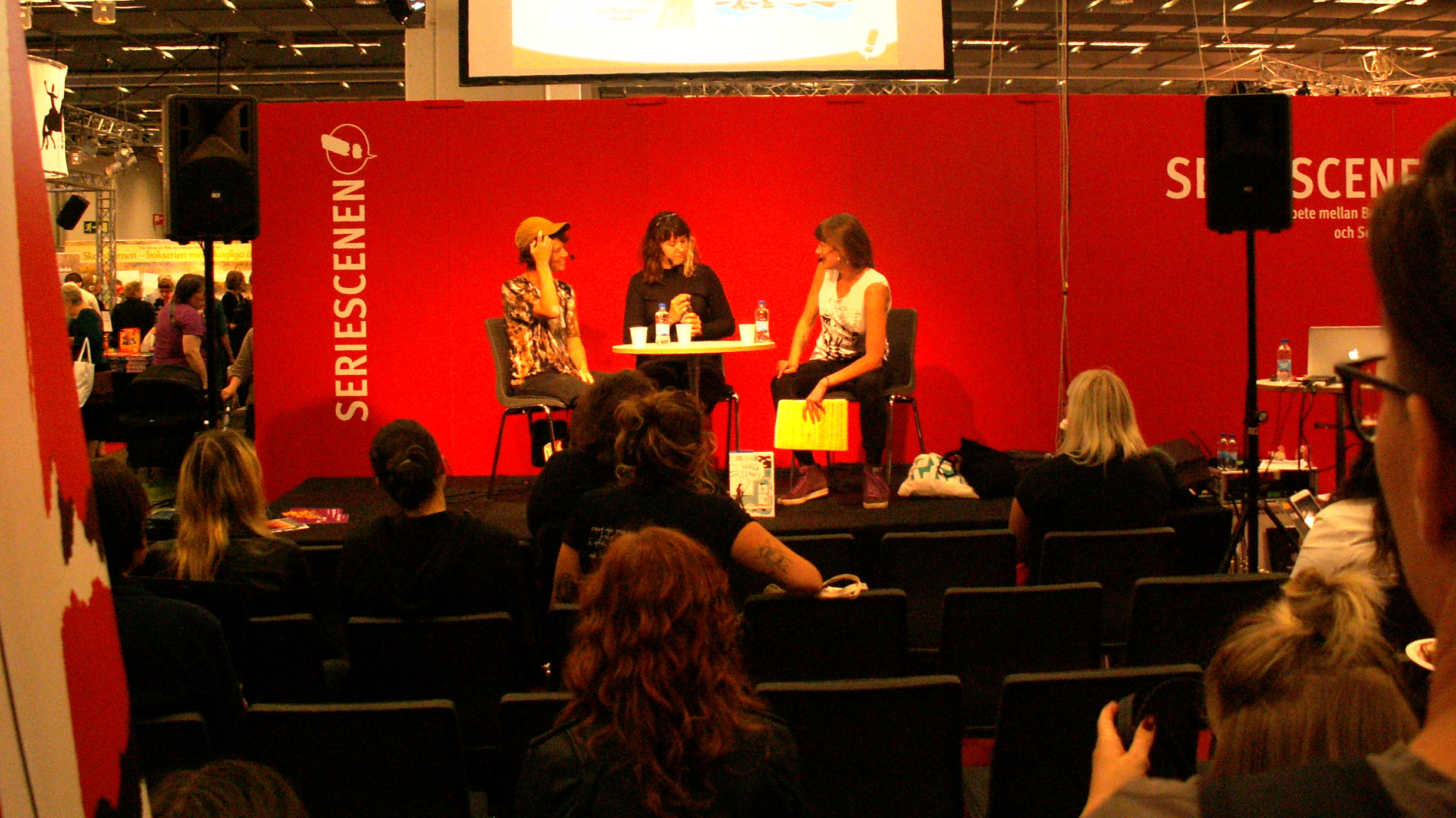 Hilda-Maria Sandgren, Daria Bogdanska och Frida Ulvegren på Bokmässan i Göteborg 2016.